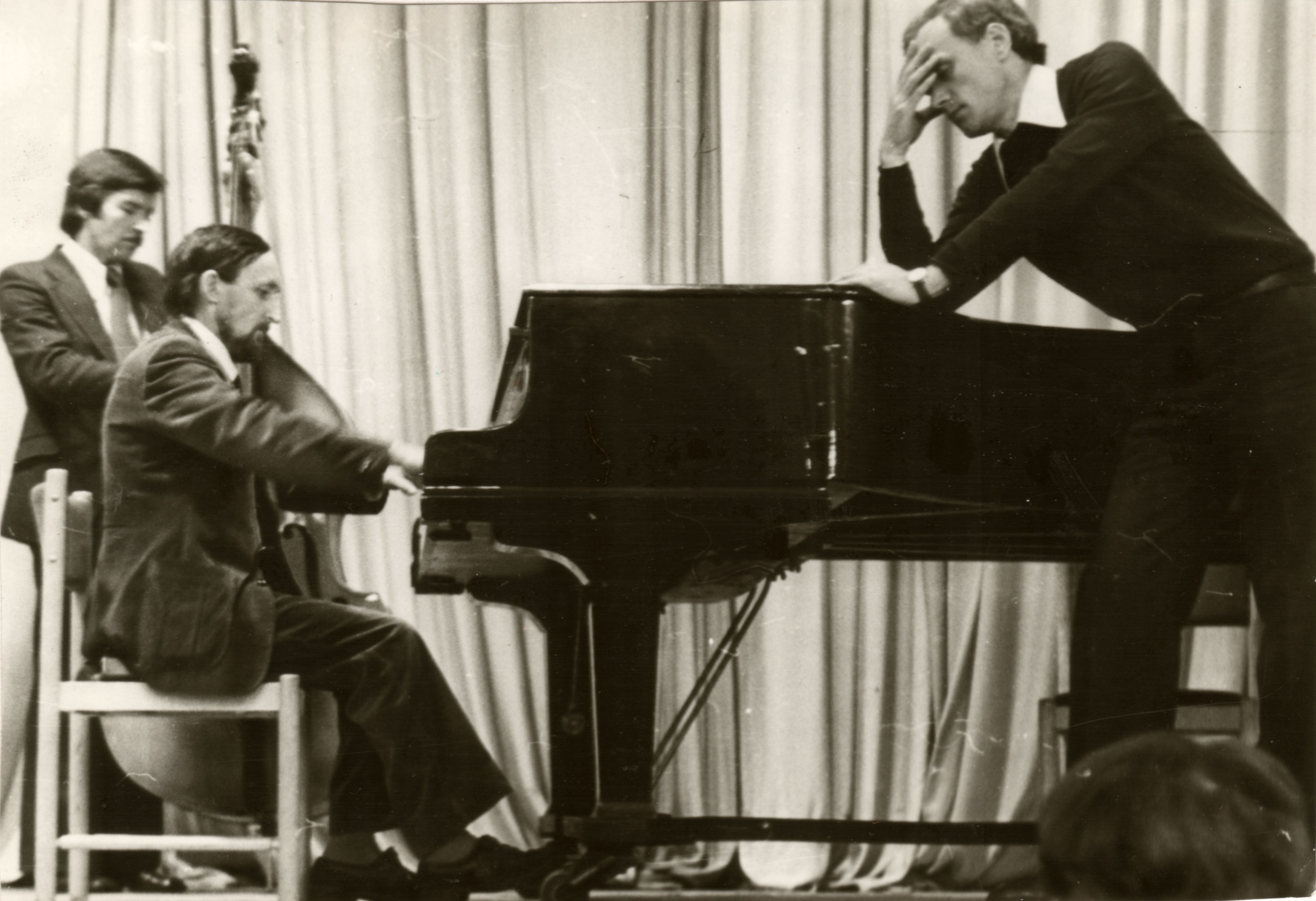 Концерт сотрудников ИСЭП. Ленинград.